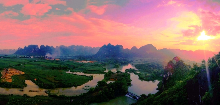 中文（中国大陆）: 扶绥左江风光